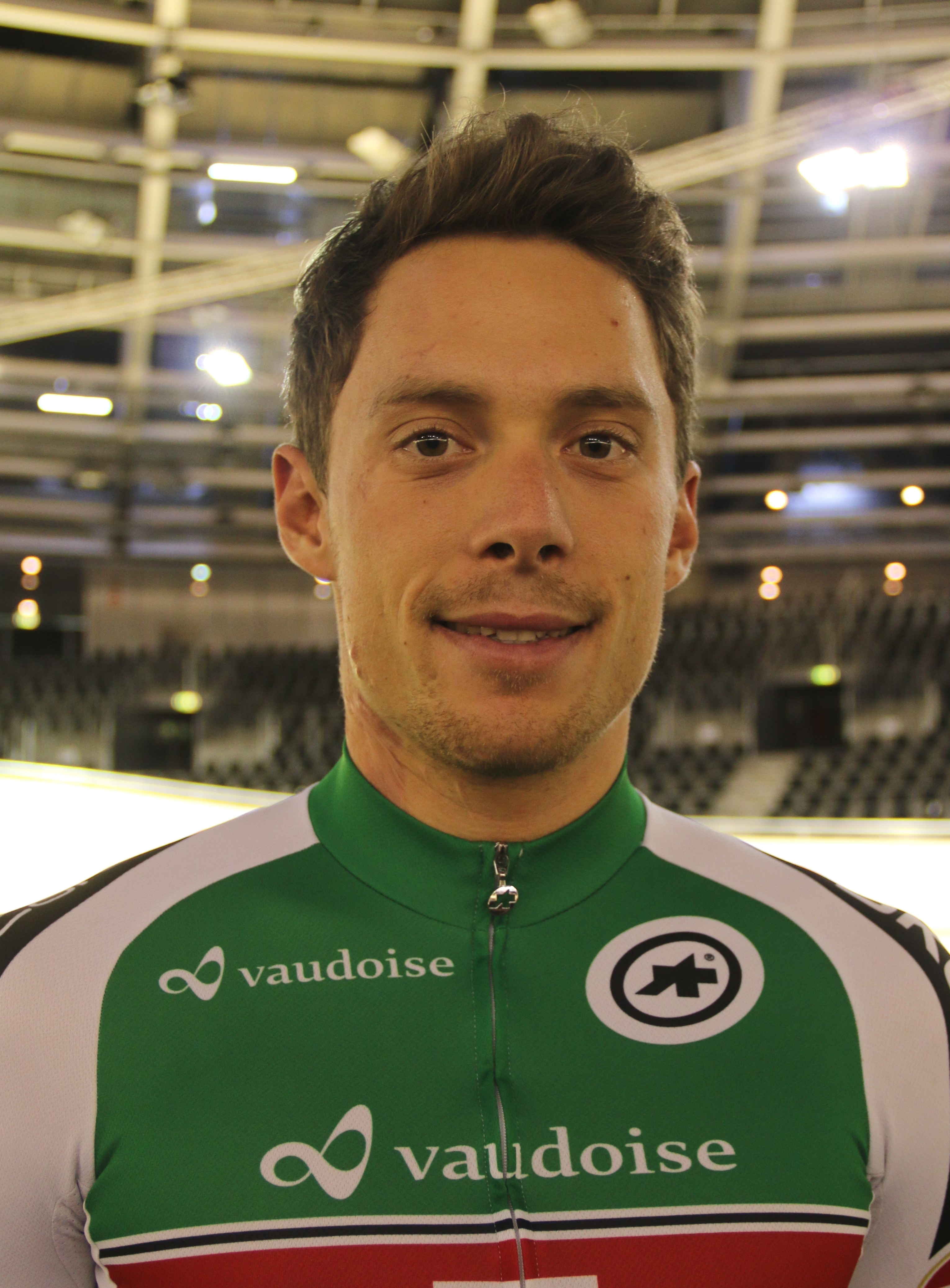 Gaël Suter, Schweizer Radsportler